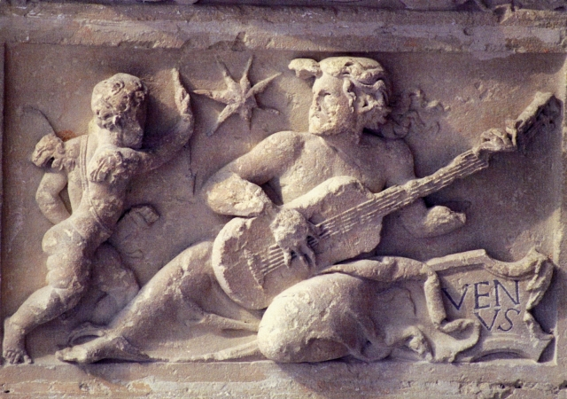 Venus vihuelista de Úbeda (Jaén). El relieve del planeta Venus está personificado en una figura masculina tañendo un laúd (o una vihuela) en el intradós de la puerta de la capilla de El Salvador por el escultor francés Étienne Chamet, ca. 1542.